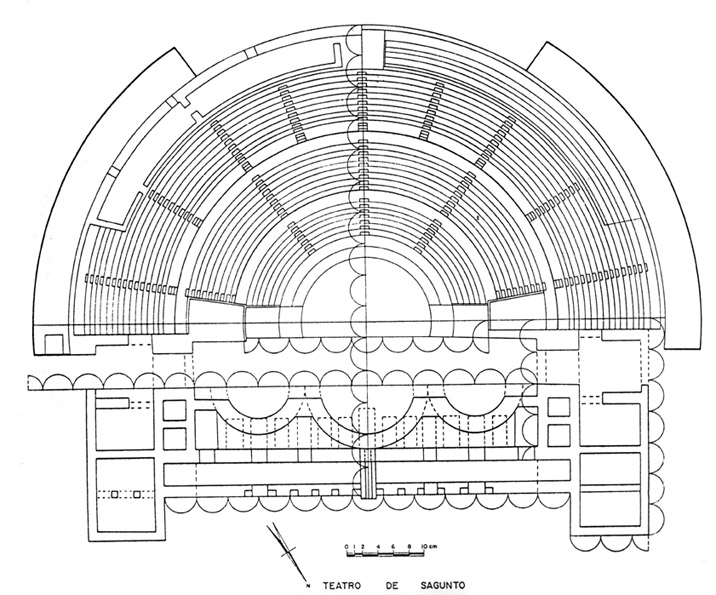 planta modular del teatro